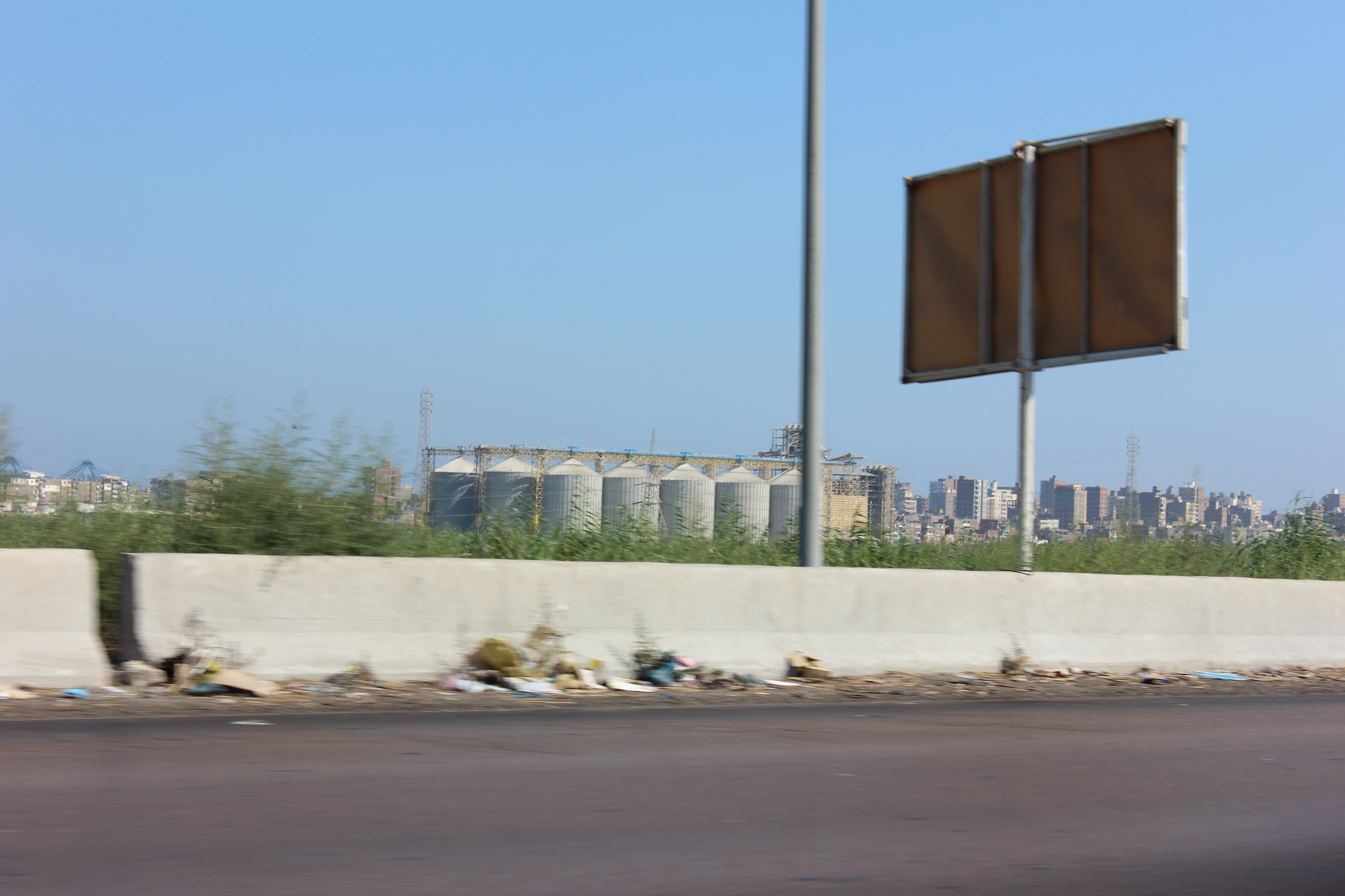 الطريق الدولي الساحلي بالإسكندرية.